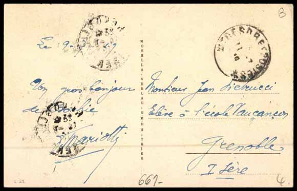 Lulustein Saarbrücken (Belle-vue). Postkarte 1910er Jahre. Text: Le 9-7-19. Un gros bonjour de Bochie. T. Mariotti. Gelaufen als französische Feldpost. Stempel: Tresor et Postes 10-7 19.